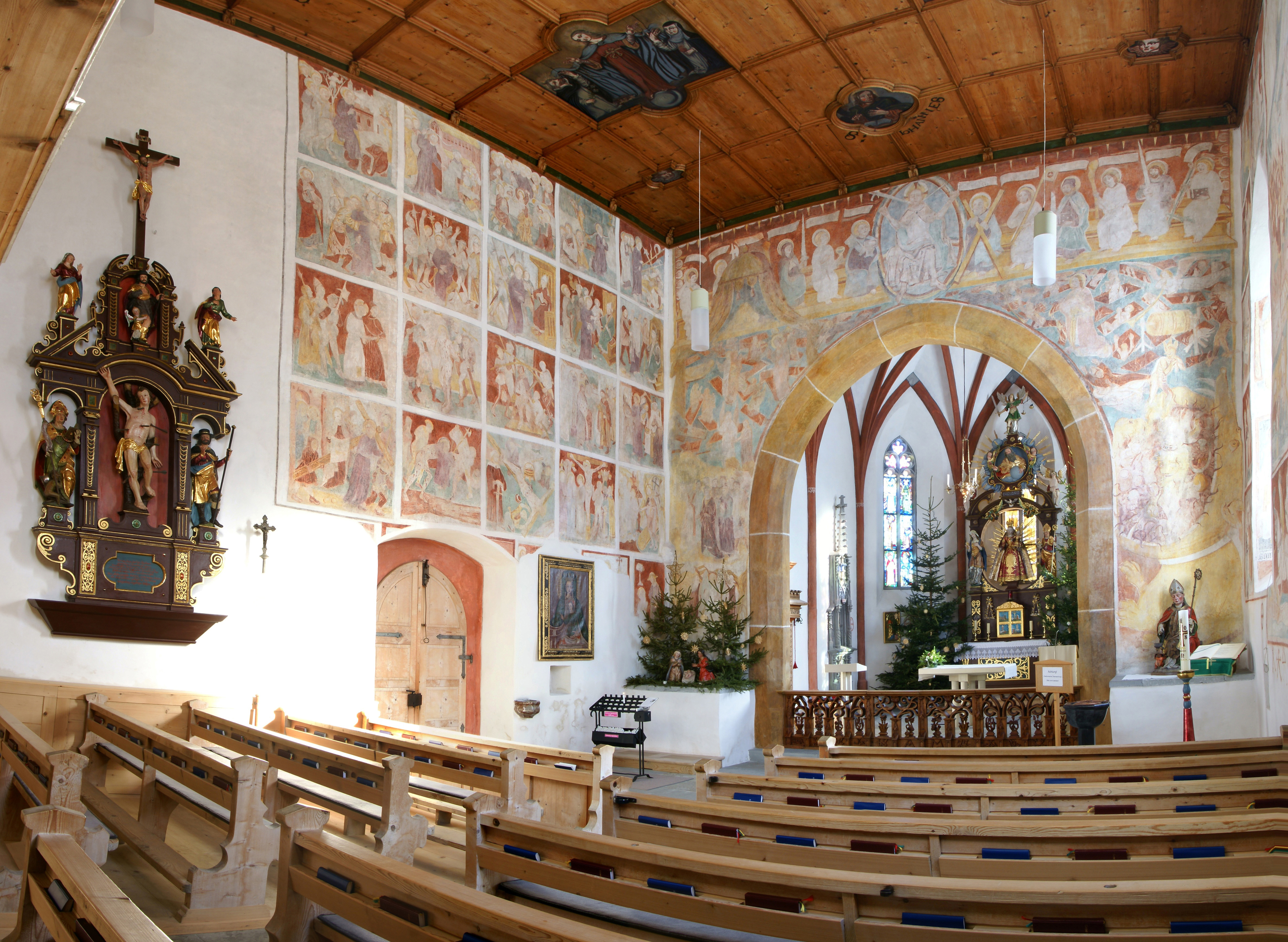 Innenpanorama zusammengesetzt mit 4 Bilder. Pfarrkirche St.Nikolaus Gotik mit “barockem” Hochaltar in Damüls Sie stellt ein kunsthistorisches Kleinod dar. 1484 von Rolle Maiger in gotischem Stil erbaut, 1693–1733 barockisiert. Von Bedeutung sind ein spätgotischer Wandfreskenzyklus (1490-1500), die bemalte Holzfelderdecke, Hochaltar mit Figuren von Ersamus Kern (um 1630), Altäre, Krönung Mariens (um 1500).